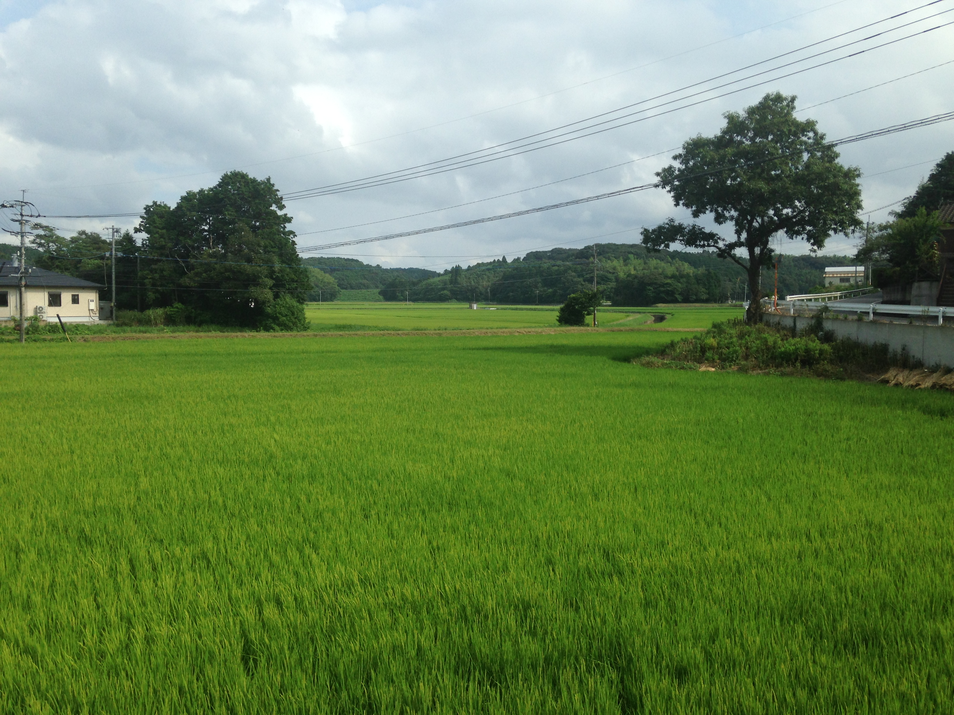 佐賀県唐津市鎮西町高野の田んぼ